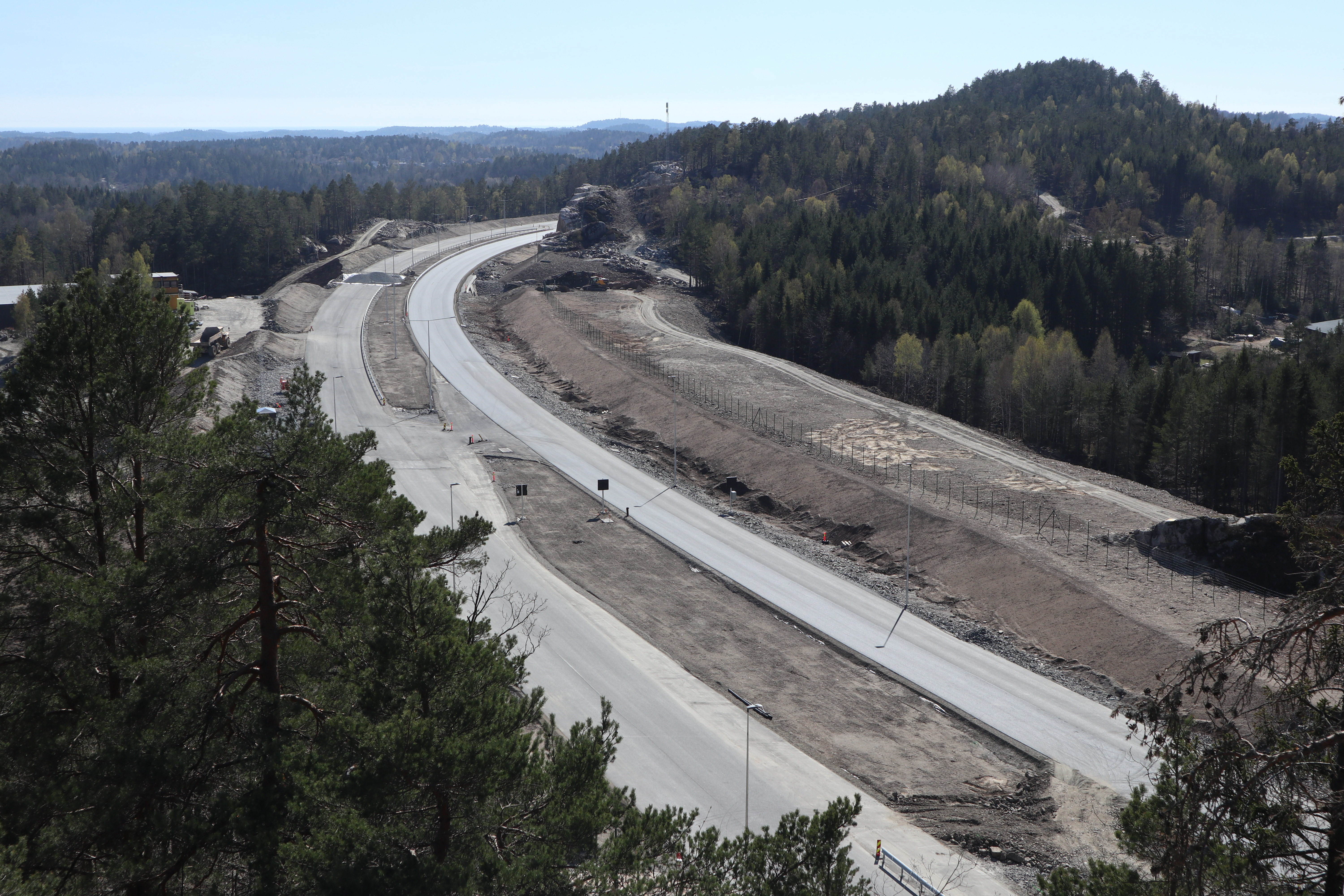 Utsikt fra Træfjell mot nye E18 i retning Hesthagfjell og Hesthagfjelltunnelen. April 2019.